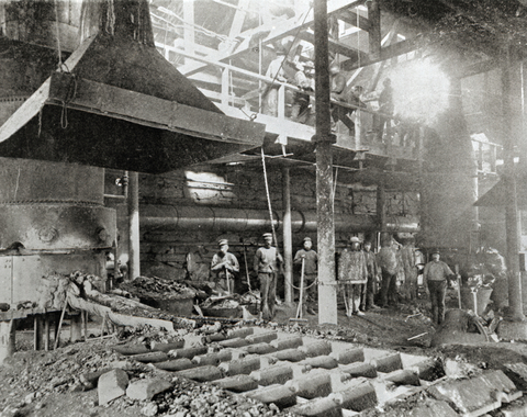 Fra den gamle smeltehytta, støping av kobberbarrer. 1900 - 1950. NM.F.008045-00009